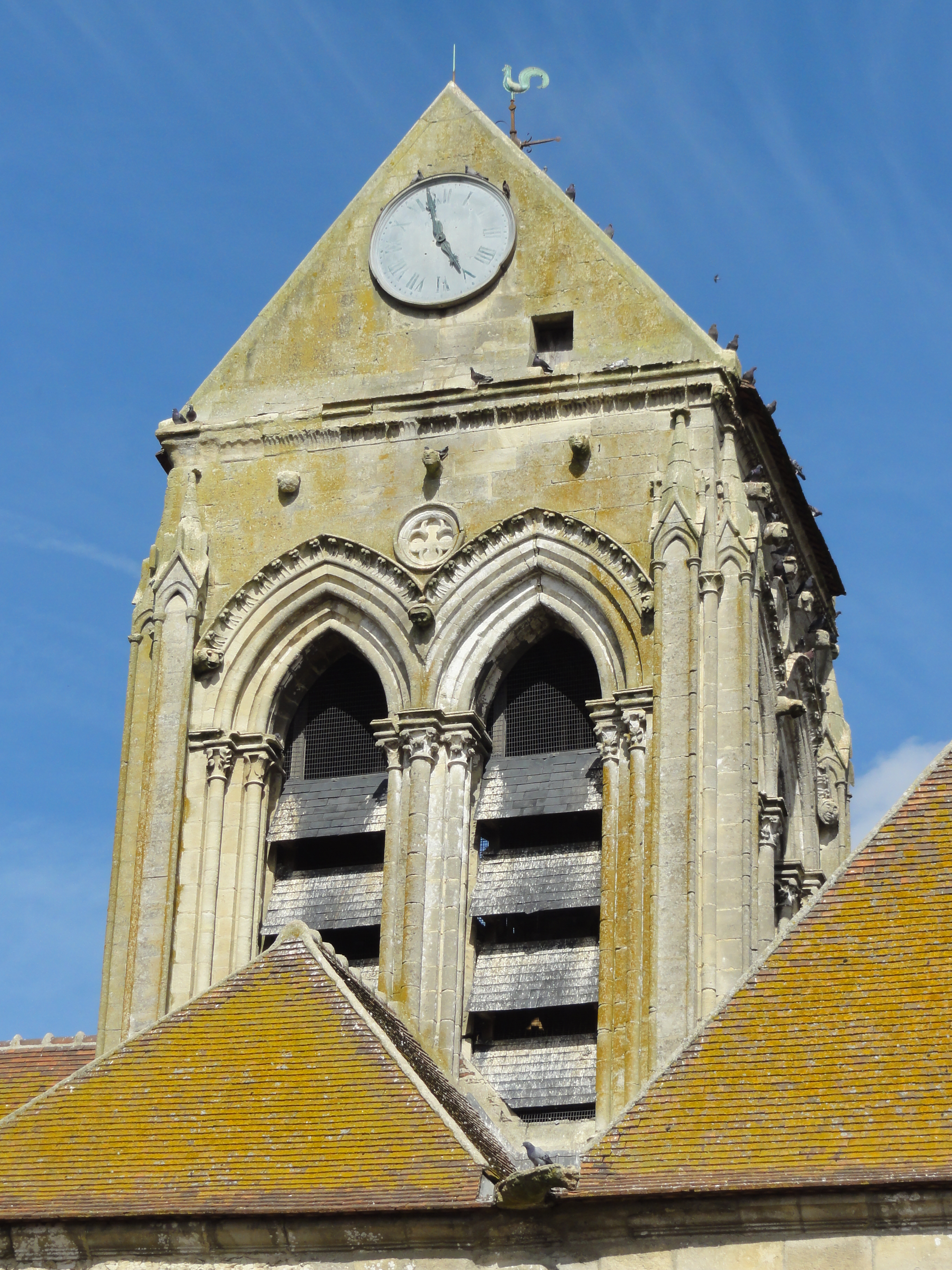 Église Sainte-Marie-Madeleine du Bellay-en-Vexin (voir titre).